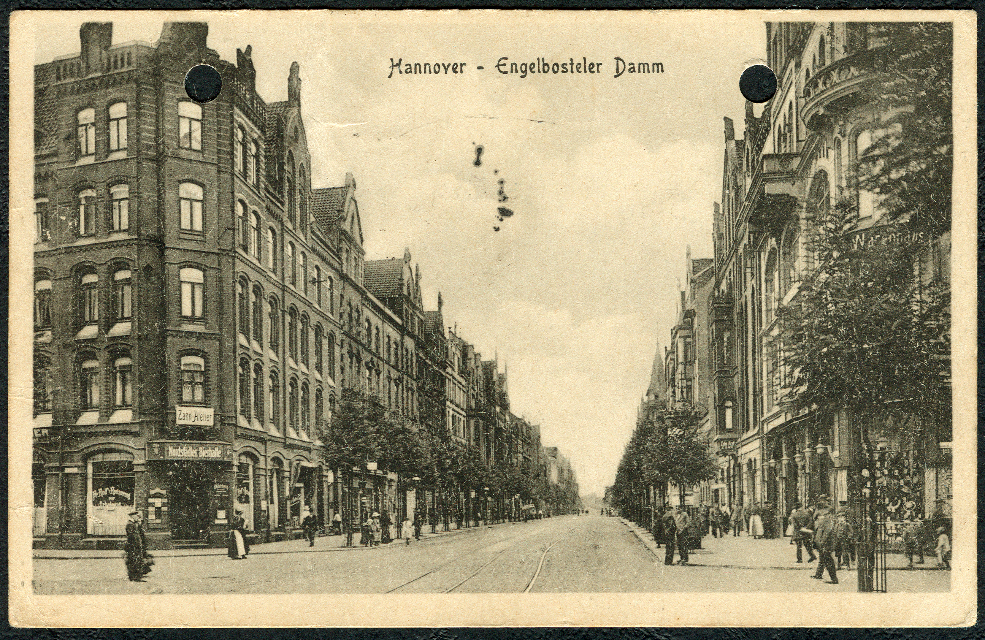 Blick um 1900 durch den Engelbosteler Damm wohl in Höhe des (heutigen) Hornemannwegs in Richtung Hainholz. Vorne links findet sich unter dem "Zahn-Atelier" die Nordstädter Bierhalle und Fr. Rolf's Restaurant Zur ... (?). Ein Großteil der Gebäude fiel den Luftangriffen auf Hannover im Zweiten Weltkrieg zum Opfer, da insbesondere die kriegswichtige Produktion der naheliegenden Continental AG ausgeschaltet werden sollte.